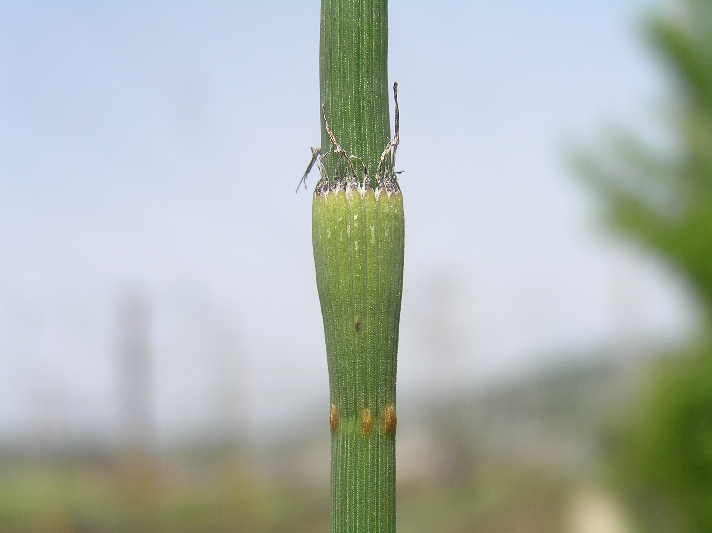 Equisetum × moorei, Brno - Židenice, Czech Republic